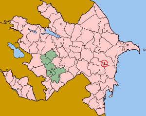 Map of Azerbaijan showing Ali Bayramli (Əli Bayramlı) sahar.